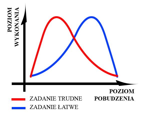 Grafika w pliku PNG z wykresem przedstawiającym Prawo Yerkesa-Dodsona dla zadań łatwych i tudnych